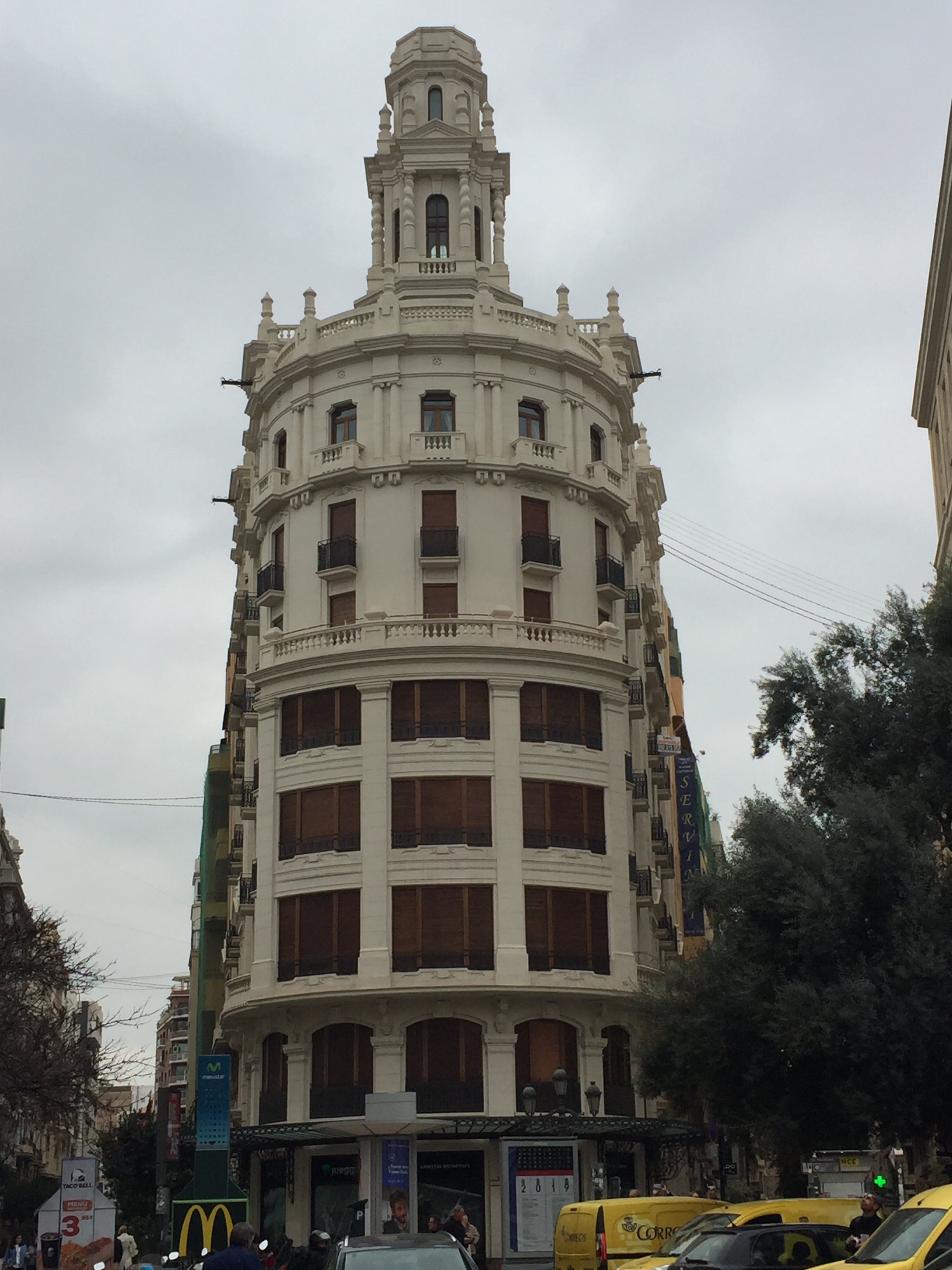 Obra de Goerlich en Valencia, edificio Balanzá